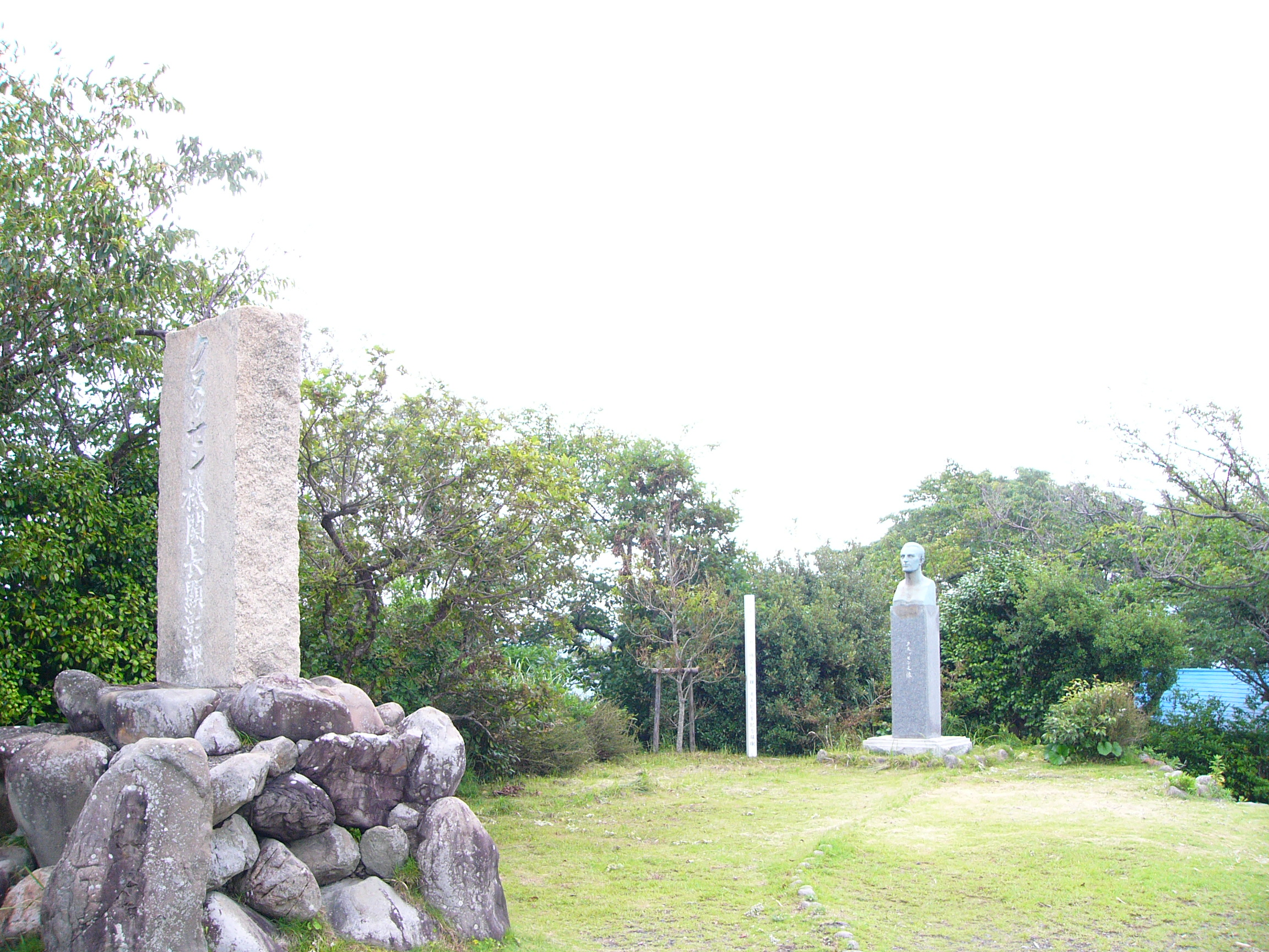 Mio, Mihama, Hidaka District, Wakayama Prefecture 644-0045, Japan